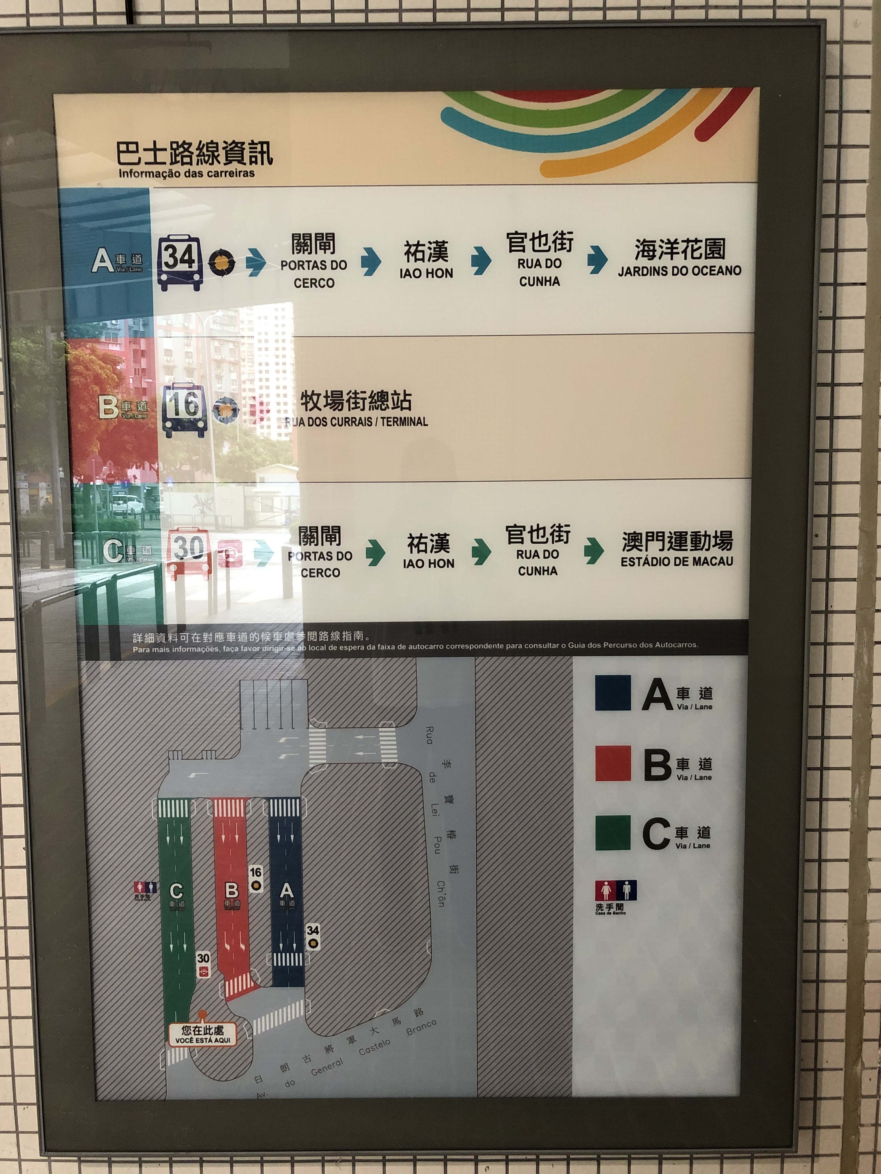 青洲坊總站的行車指示牌。